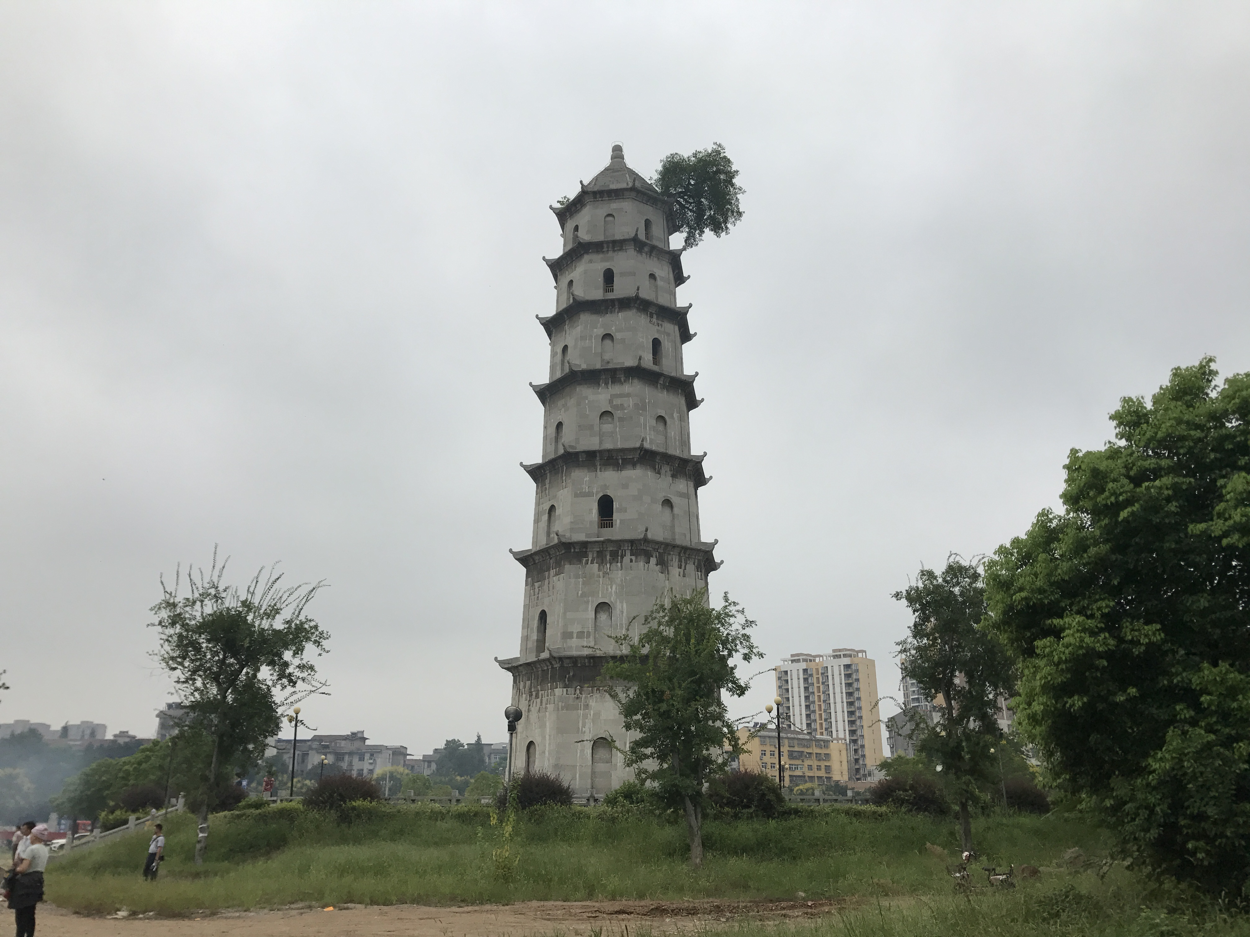 湖北省黄岡市黄州区・青雲塔